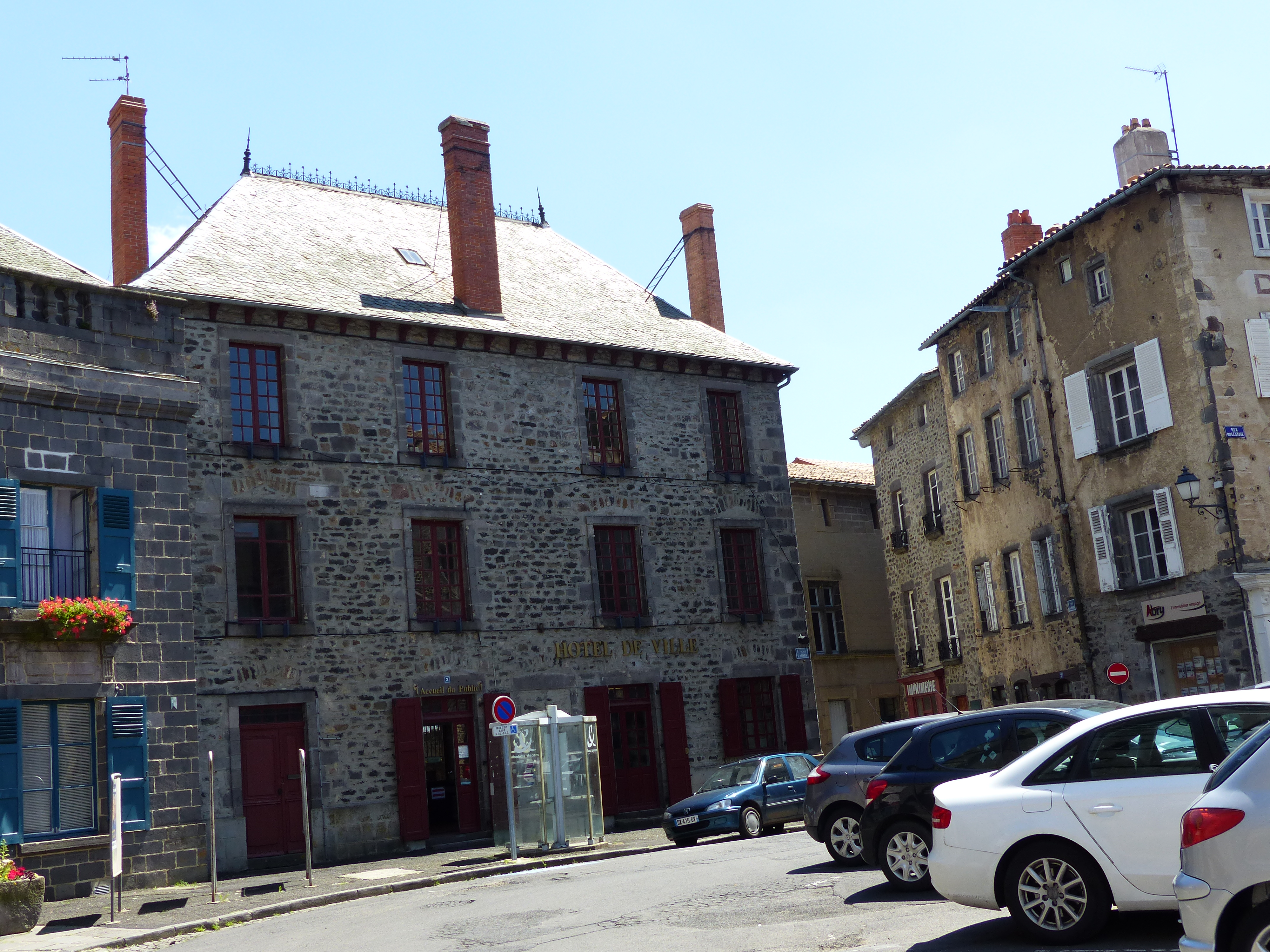 Palais Episcopal .